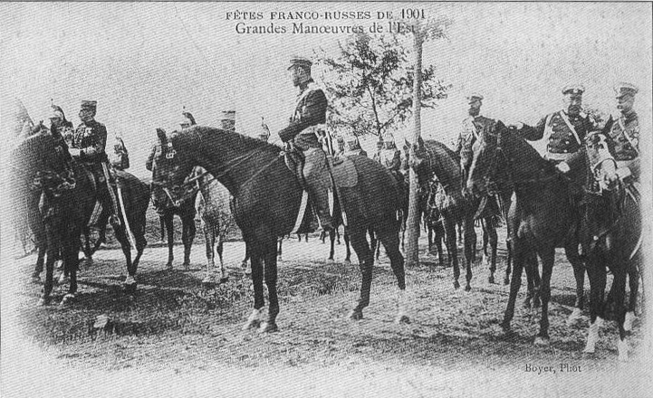 la visite du tzar à Reims lors de manoeuvres militaires, ils se trouvent devant le fort de Fresne. carte postale de 1901.